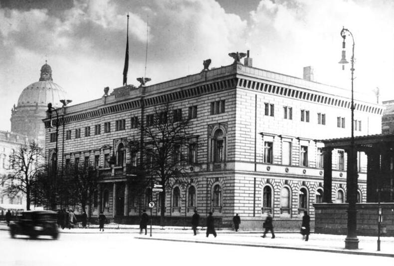 Berlin, Unter den Linden, Kommandantur ADN-ZB/Archiv Berlin im Dezember 1937 Das Gebäude der Kommandatur an der Strasse Unter den Linden, gegenüber dem Zeughaus. [Scherl Bilderdienst]